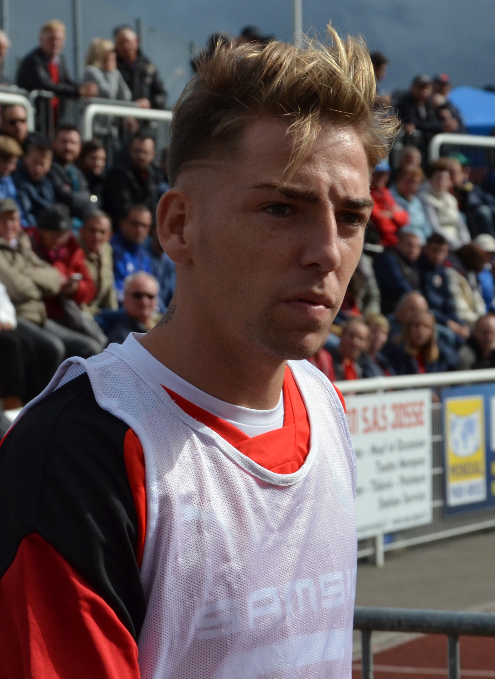 Photographie prise lors du match opposant le Stade rennais au SM Caen en match amical au stade Pierre-Compte de Vire le 22 juillet 2017. Ici, Brandon.